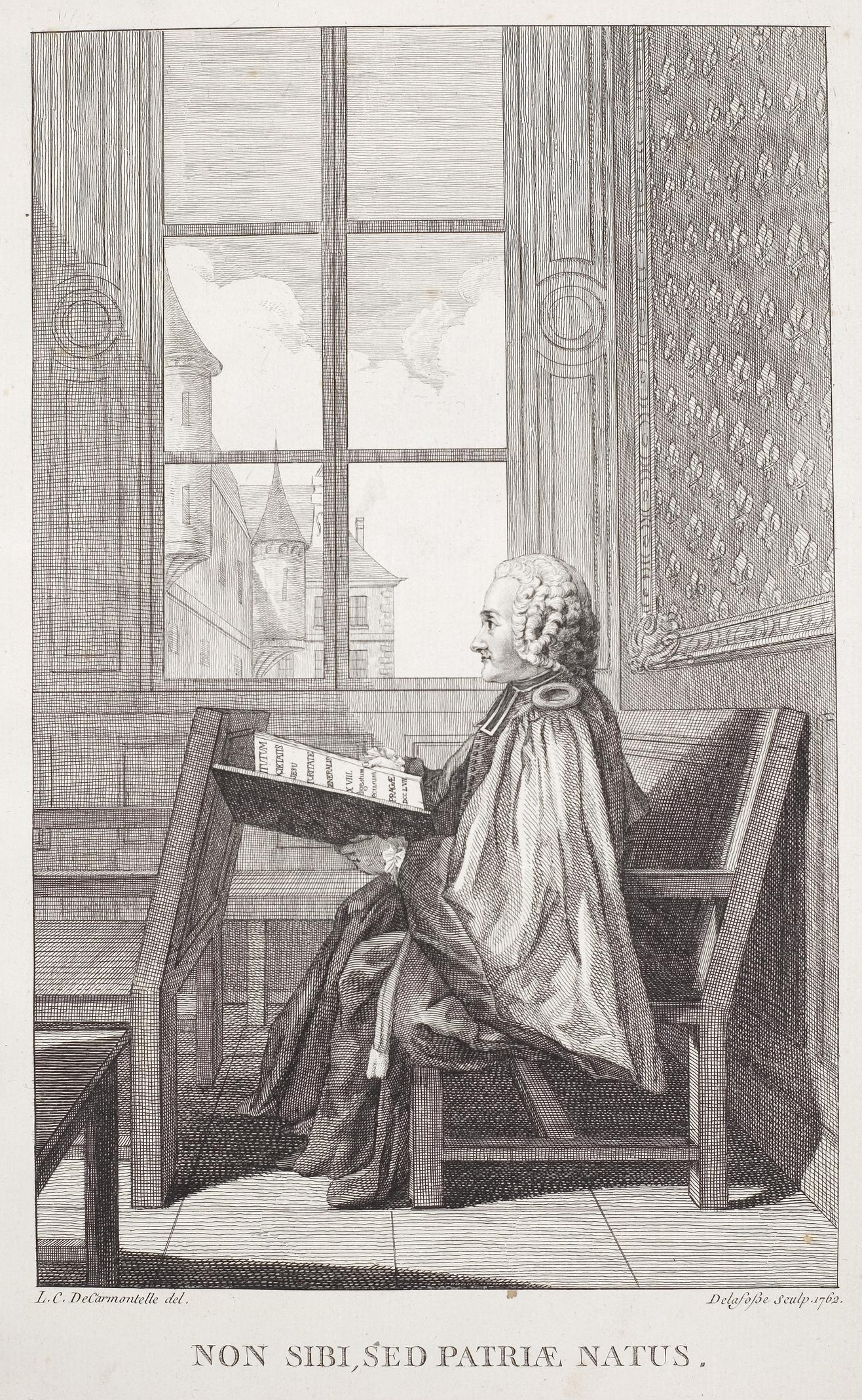 Grafik aus dem Klebeband Nr. 14 der Fürstlich Waldeckschen Hofbibliothek Arolsen Motiv: "Non sibi sed patriae natus" (handschriftlicher Zusatz:) M. l'abbé Chauvelin Conseiller au Parlement" (Henri Philippe Chauvelin, 1714-1770)